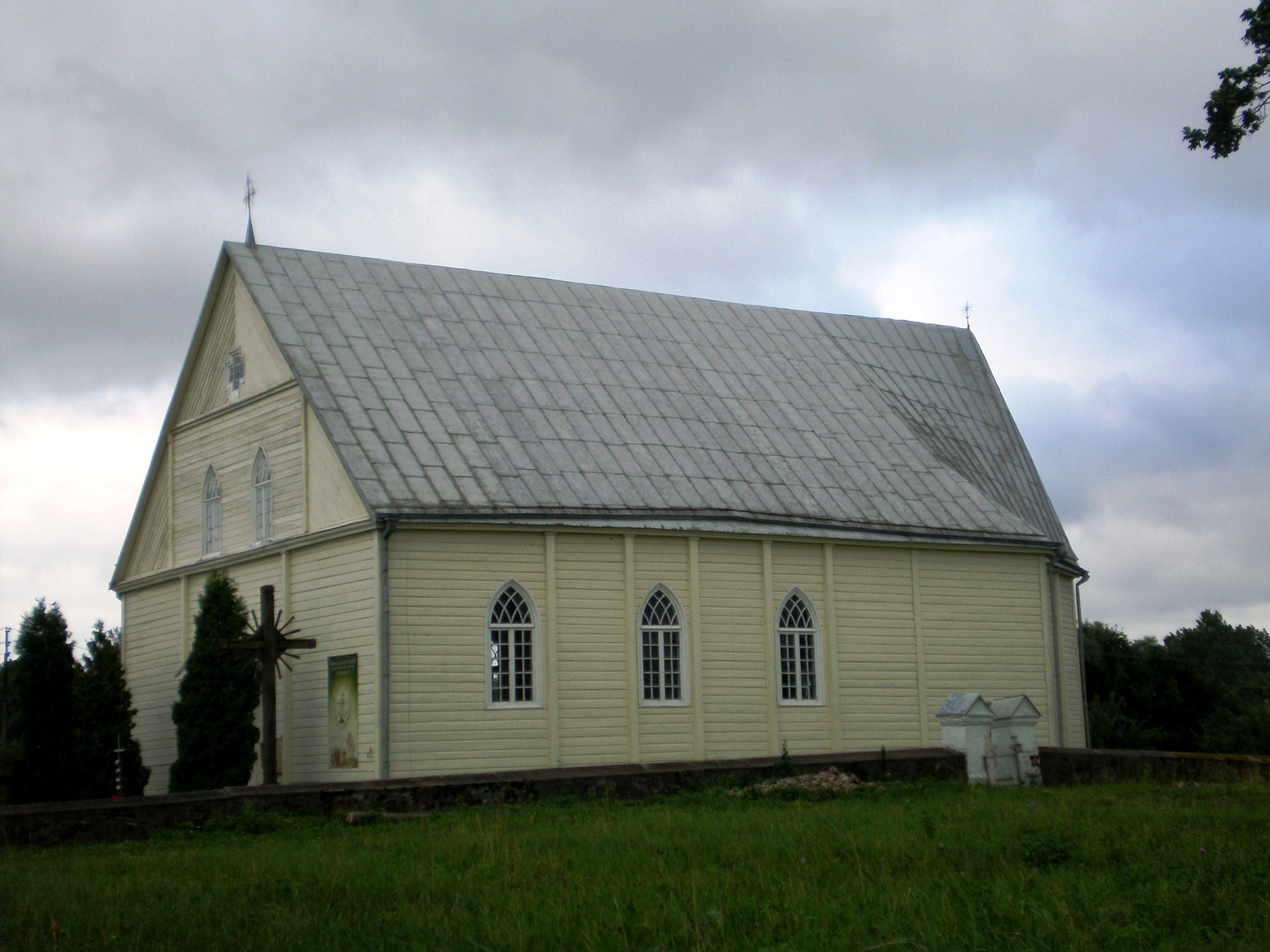 Žaiginio bažnyčia, Raseinių raj.